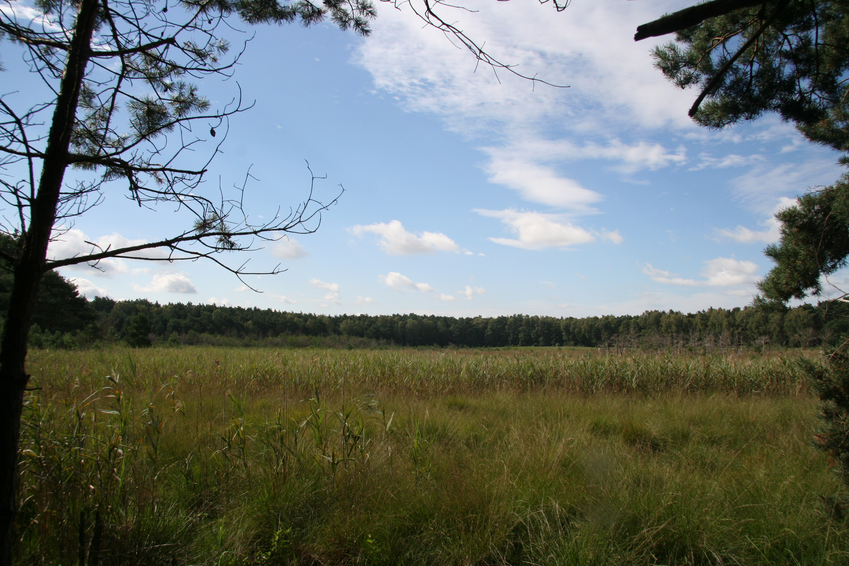 NSG "Teufelsluch" westlich von Schuhlen-Wiese in Brandenburg